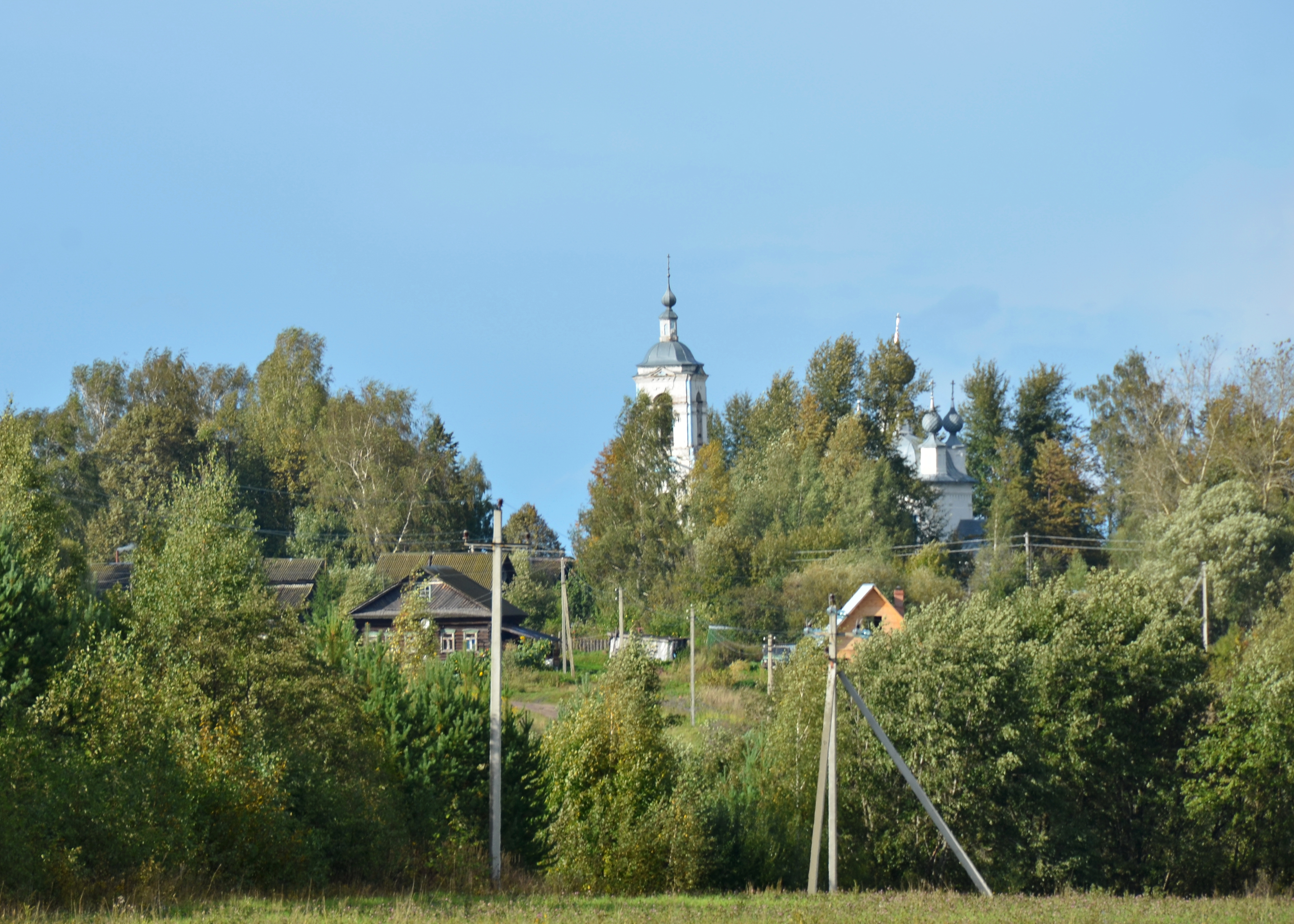 Церковь Рождества Богородицы (Ивановская область, Юрьевец, село Жарки)